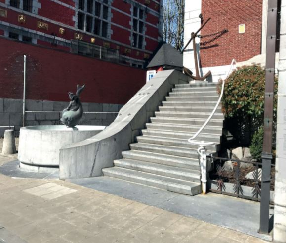 escalier principale Port autonome de liège.